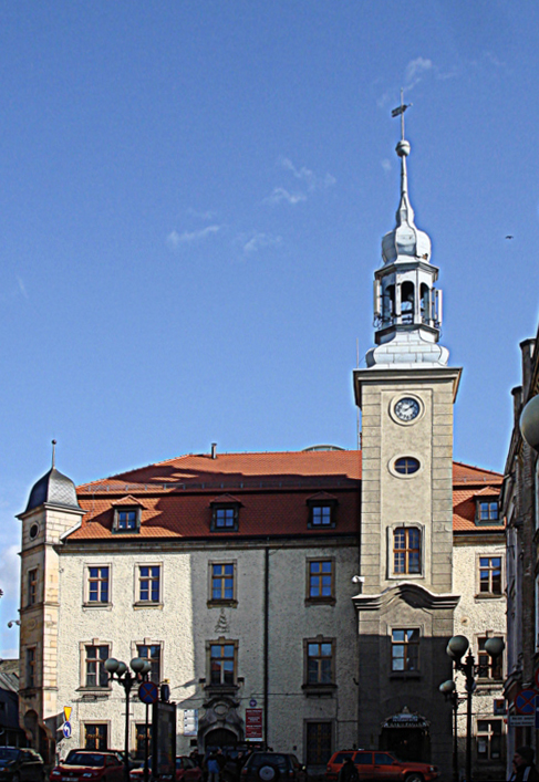 Boguszów-Gorce, ratusz